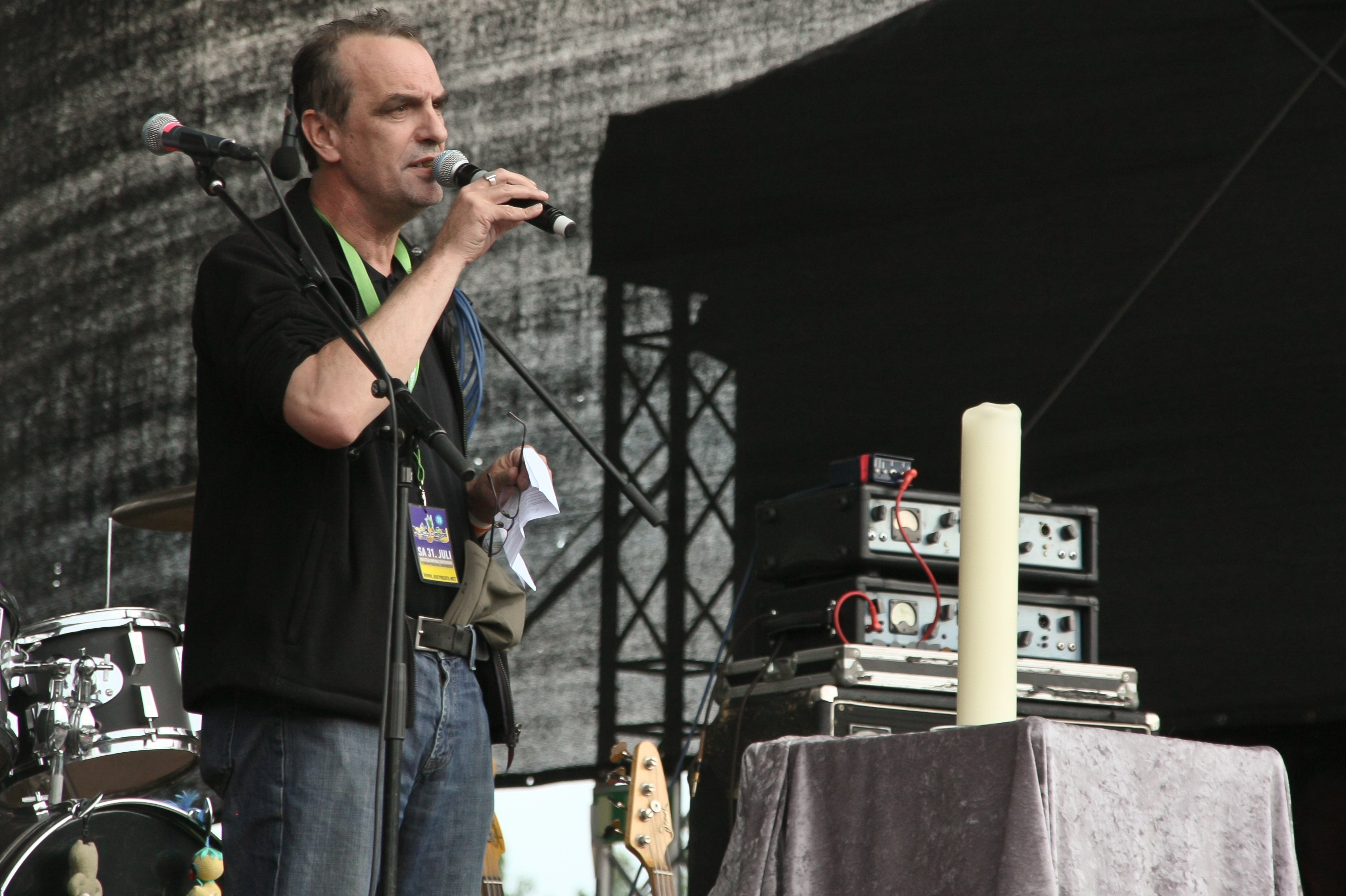 Gedenken an die Opfer der Loveparade 2010 beim Juicy Beats Festival in Dortmund (im Bild: Klaus Fiehe)